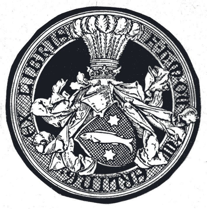 Ex libris F.H.M. Ouwerling (jongste broer van Hendrik)